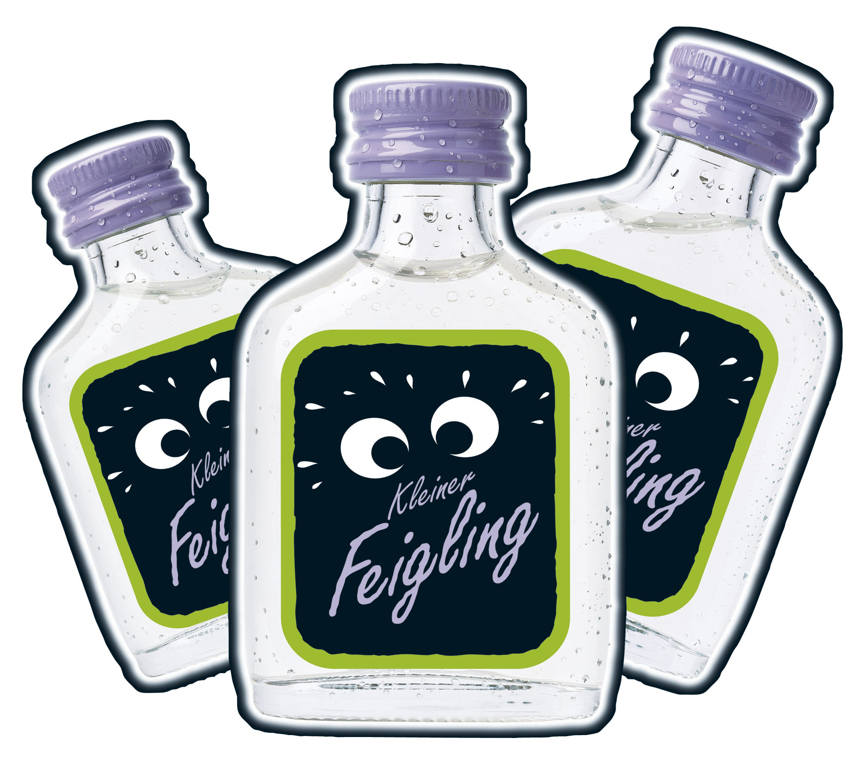 Typische Flasche